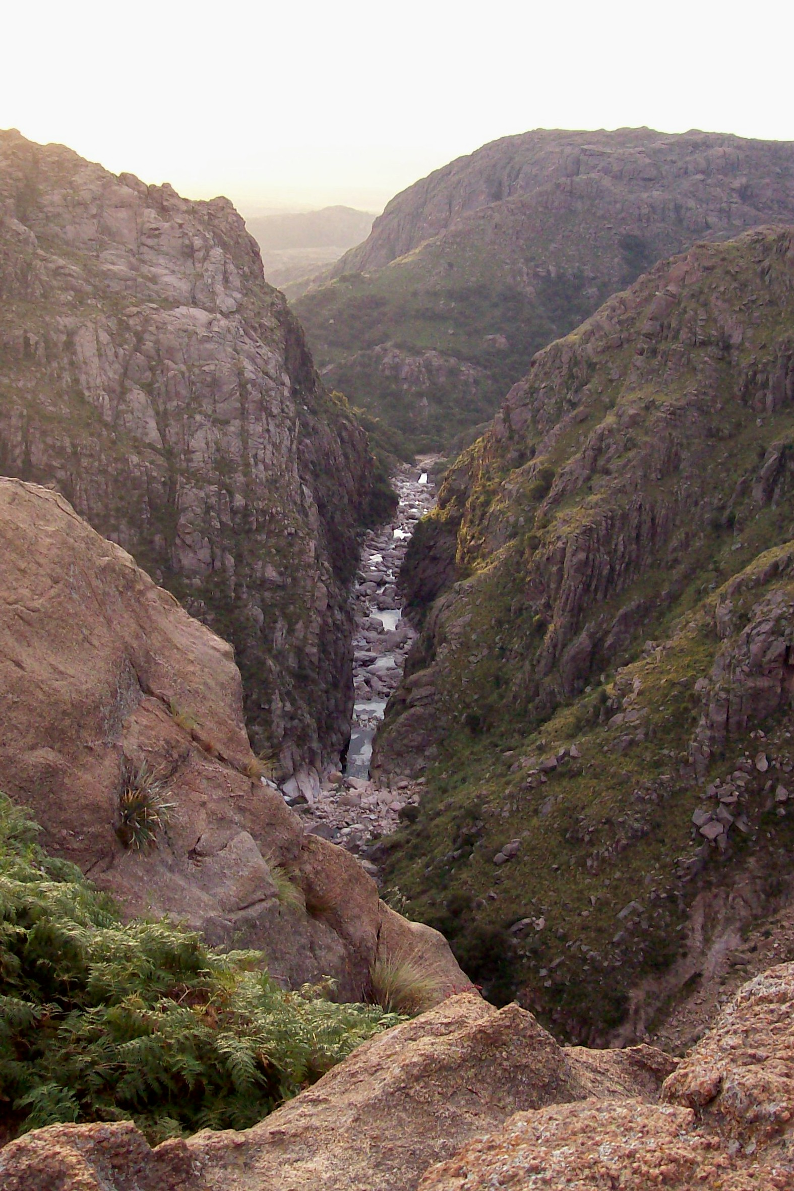 Nacimiento del río Mina Clavero, provincia de Córdoba, Argentina.